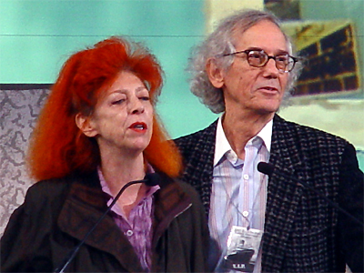 Christo und Jeane Claude beim Ellis Island Heritage Award